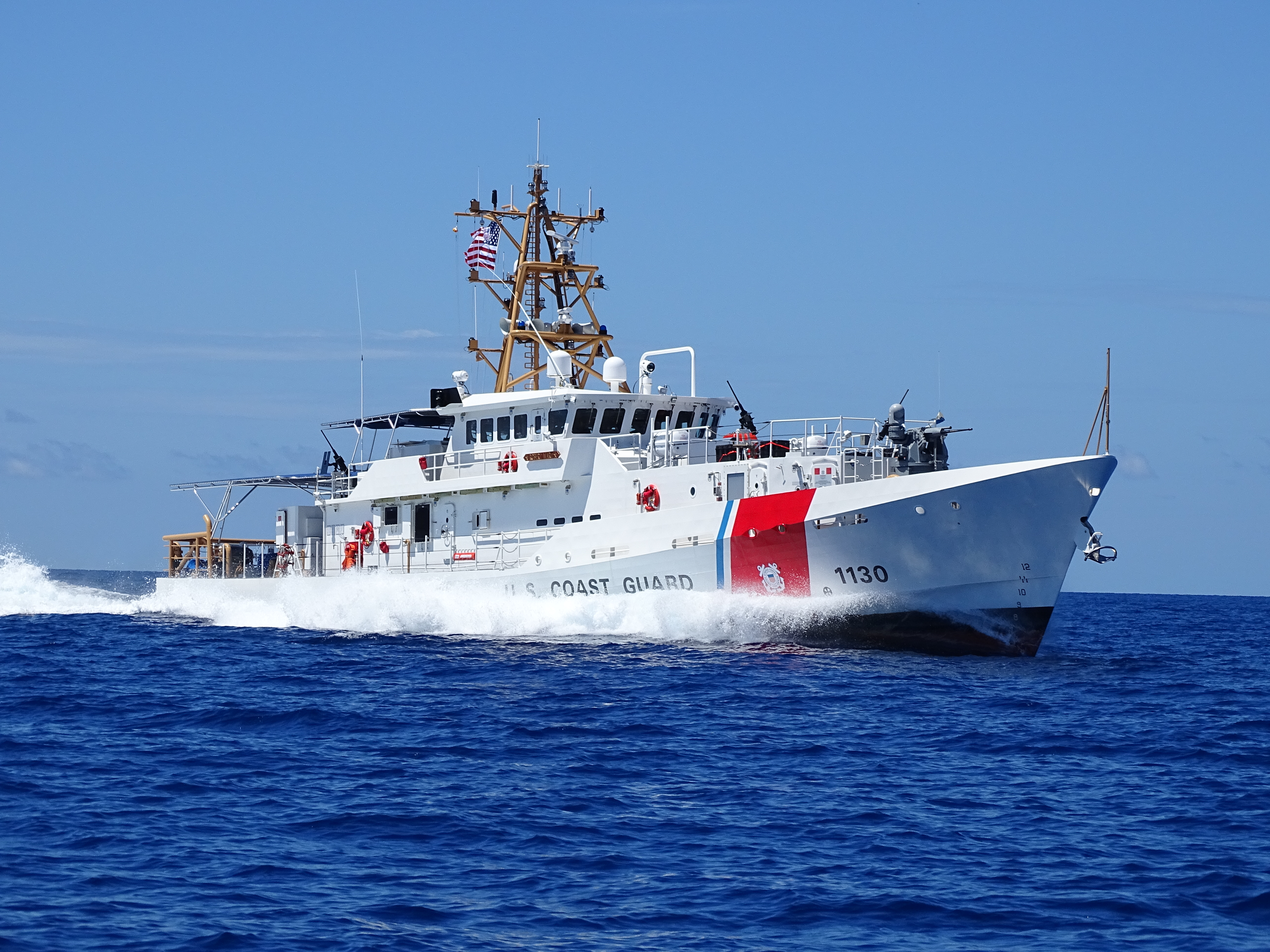 Photo taken on Maiden Voyage